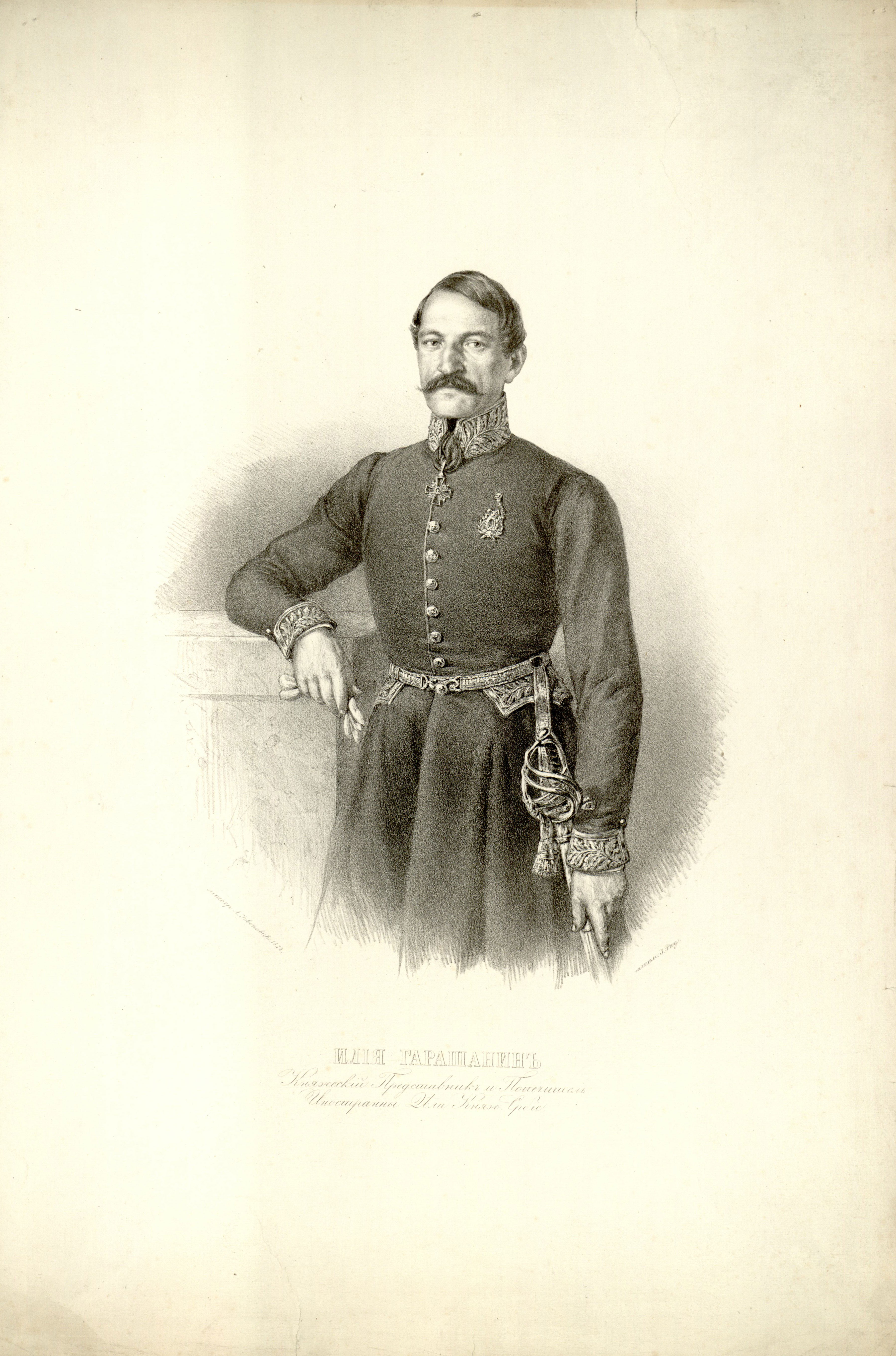 Lithograph of Ilija Garašanin by Anastas Jovanović. Caption: литогр. А. Іовановић 1852.штам. І. Рау. ИЛІЯ ГАРАШАНИНЪ Княжескій Представникъ и Попечитель Иностранны Дѣла Княж. Србіе.